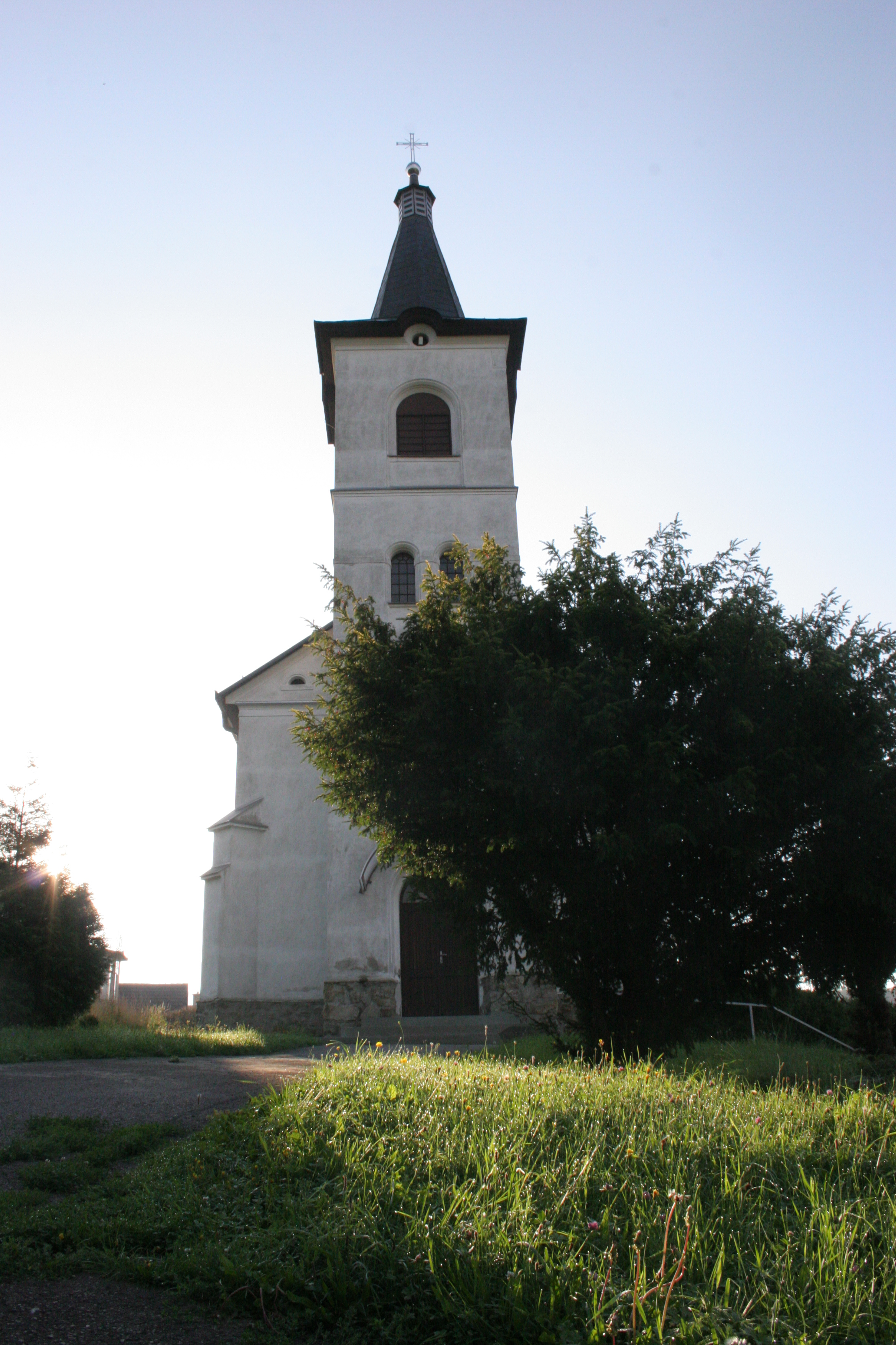 Kostol v Jalovci.